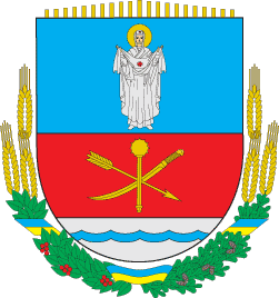 Герб Ставищенського району